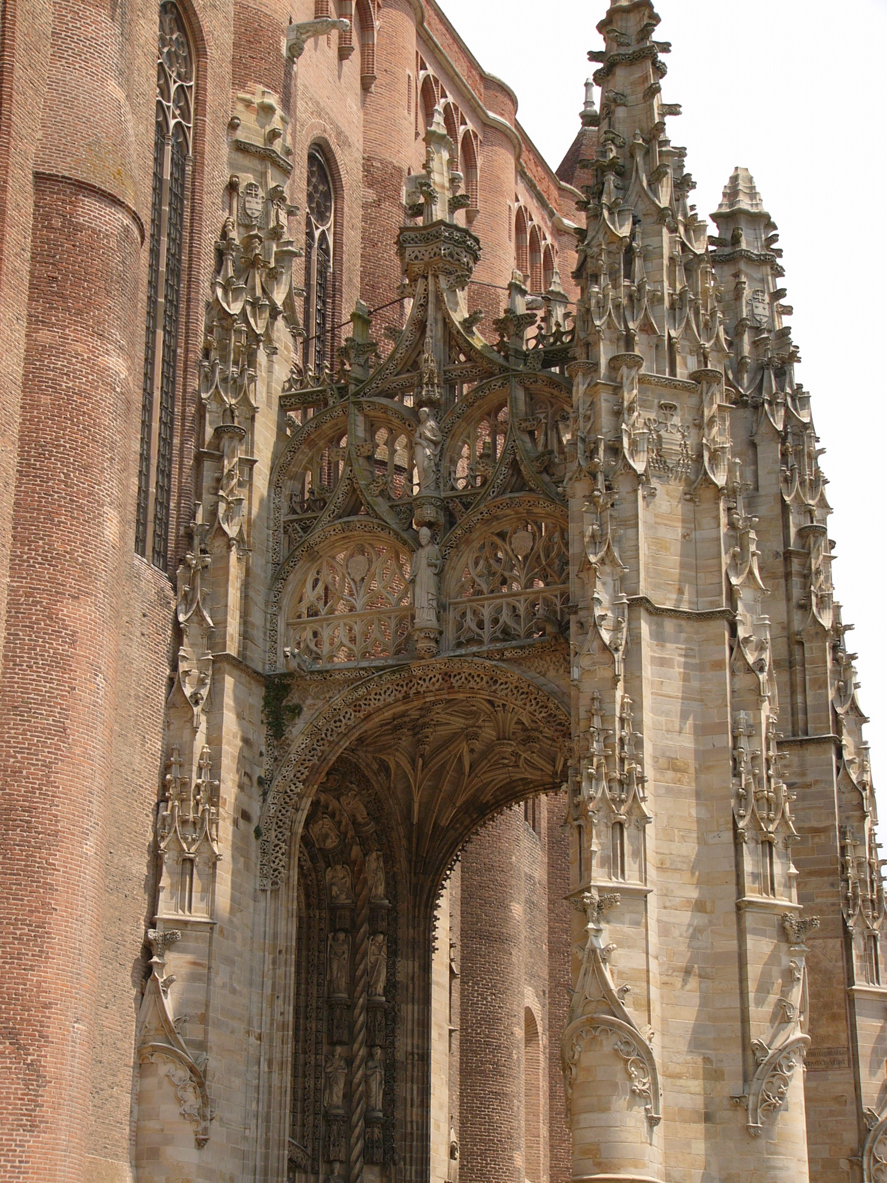 Portaal kathedraal van Albi